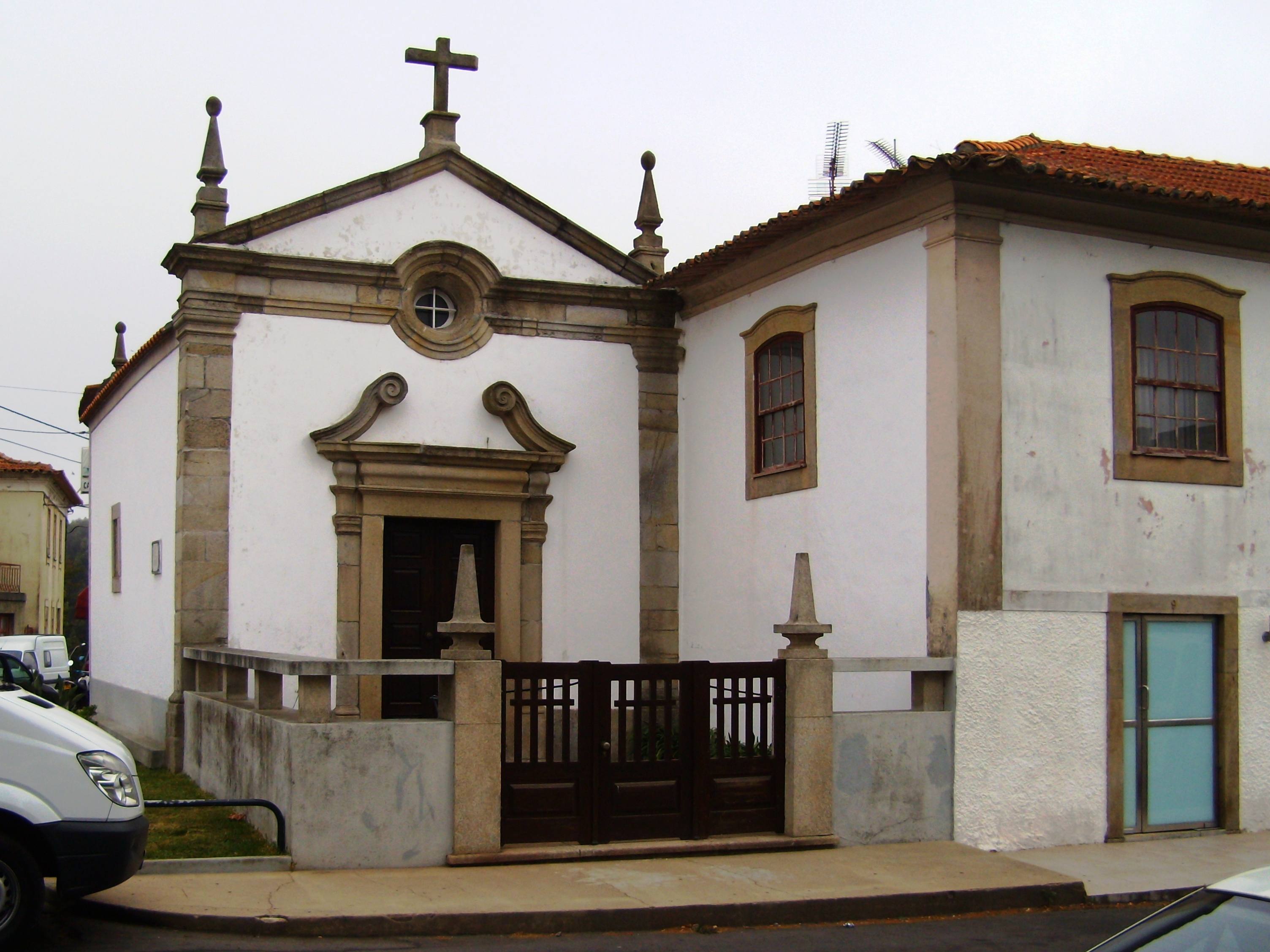 Capela de São José, Cortegaça, concelho de Ovar, distrito de Aveiro, Portugal.